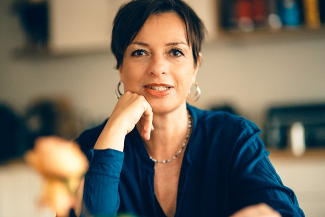 Portrait von Miriam Gebhardt